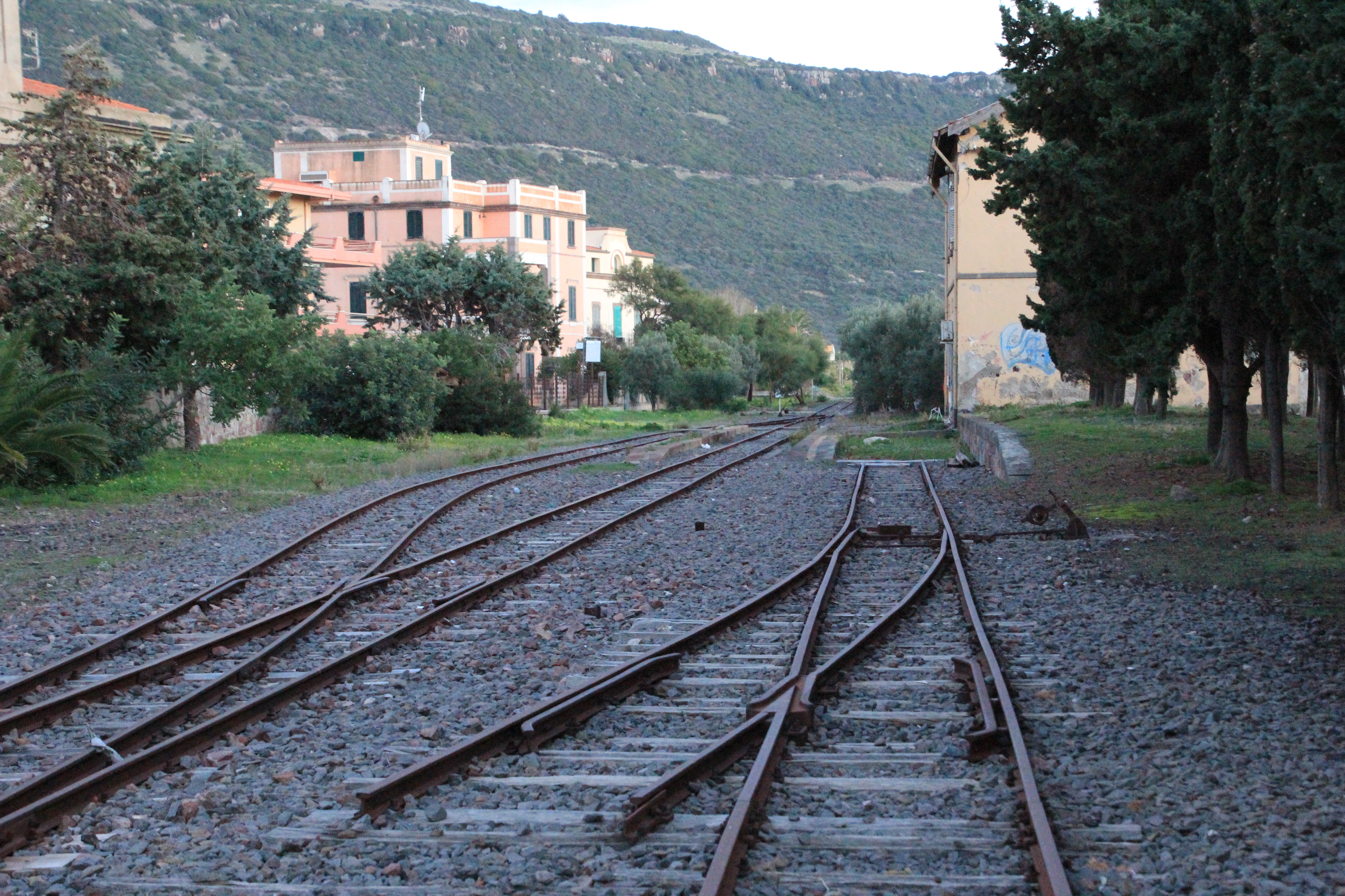 Bosa, stazione ferroviaria di Bosa Marina